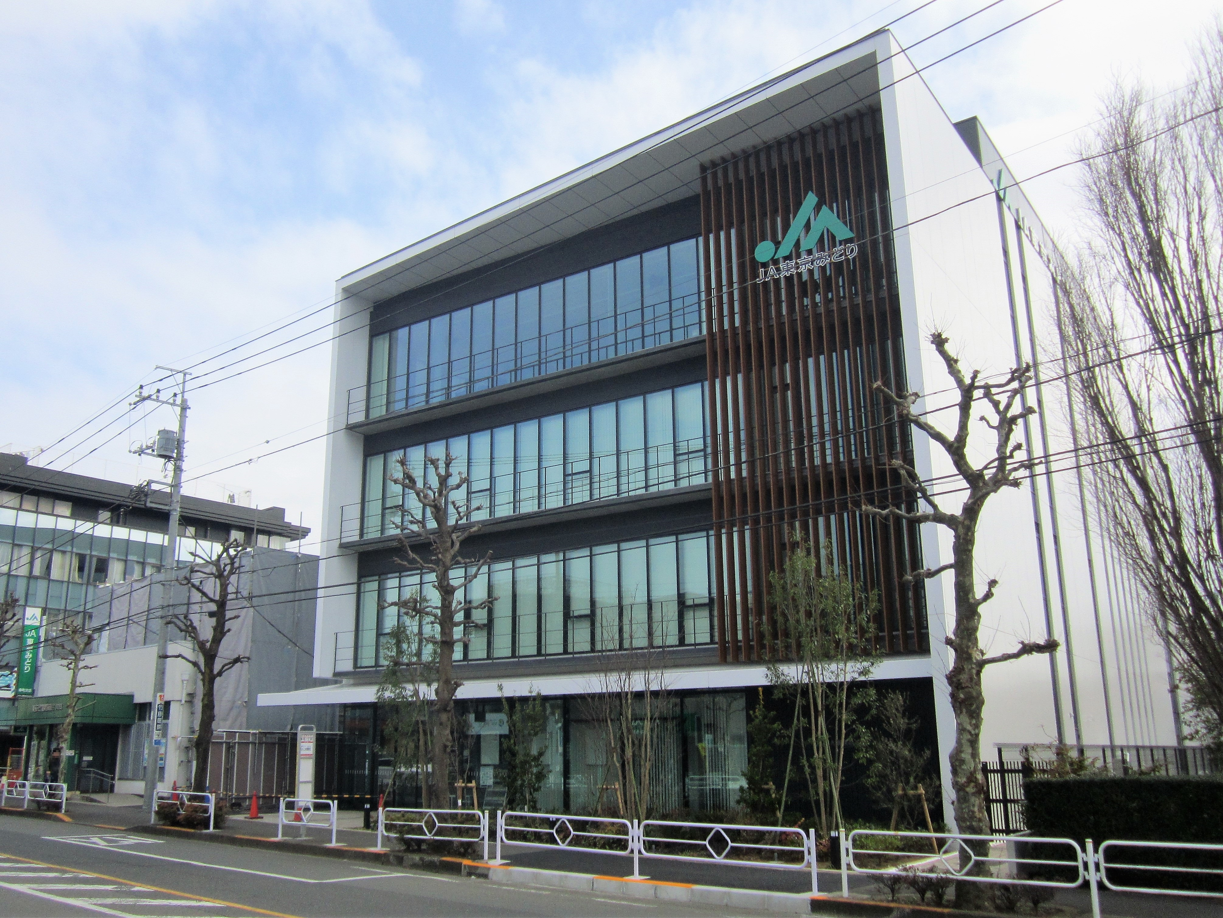 東京みどり農業協同組合 本店（2020年3月30日移転）・幸町支店（2020年3月16日移転）（立川市幸町）